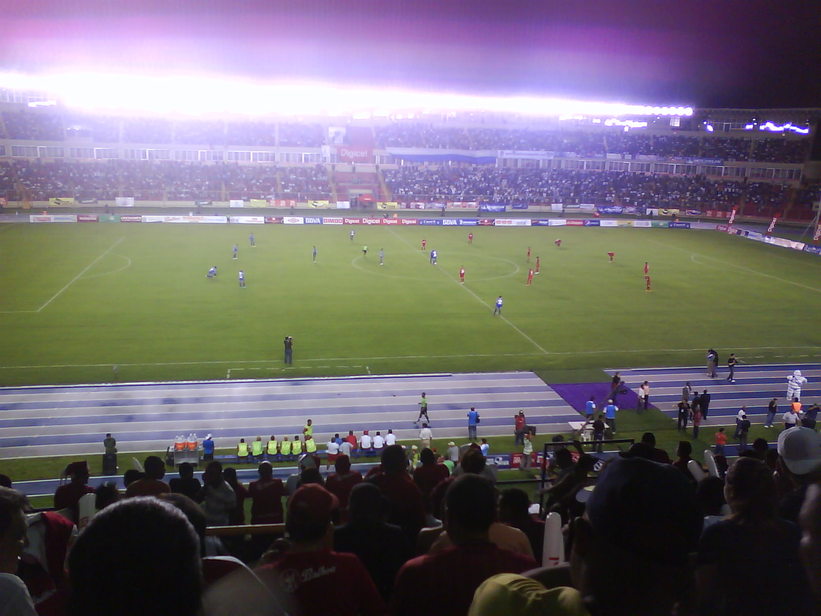 Partido final del toreno clausura 2010 de la LPF, entre del Árabe Unido y el San Francisco.